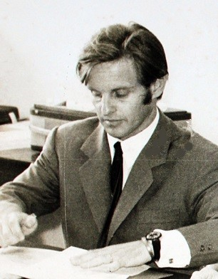 Le Dr Claude Gateff, chef de l'unité de recherche appliquée de l'OCEAC